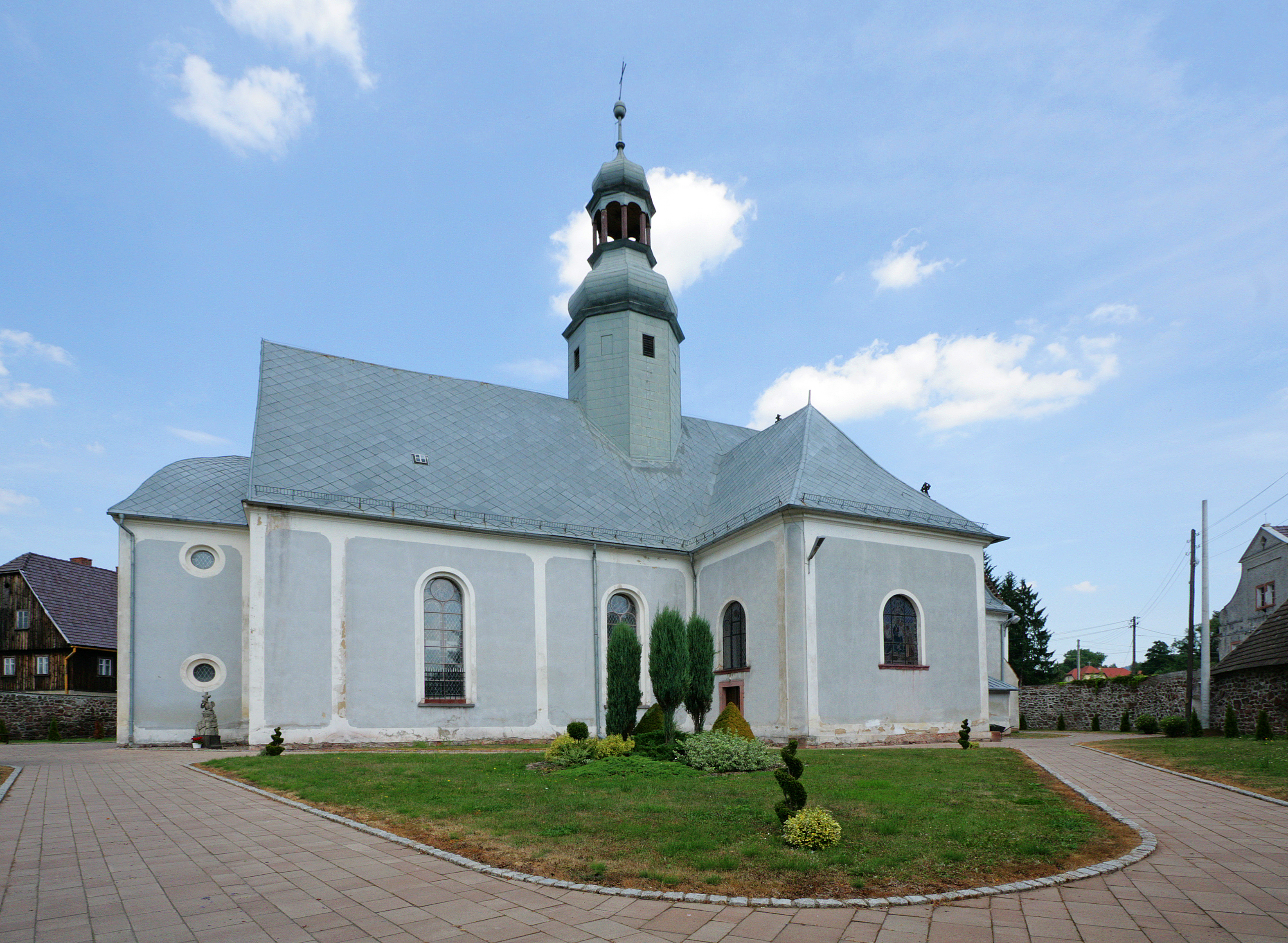 Ścinawka Średnia, kościół par. p.w. św. Marii Magdaleny, XIV, 1738